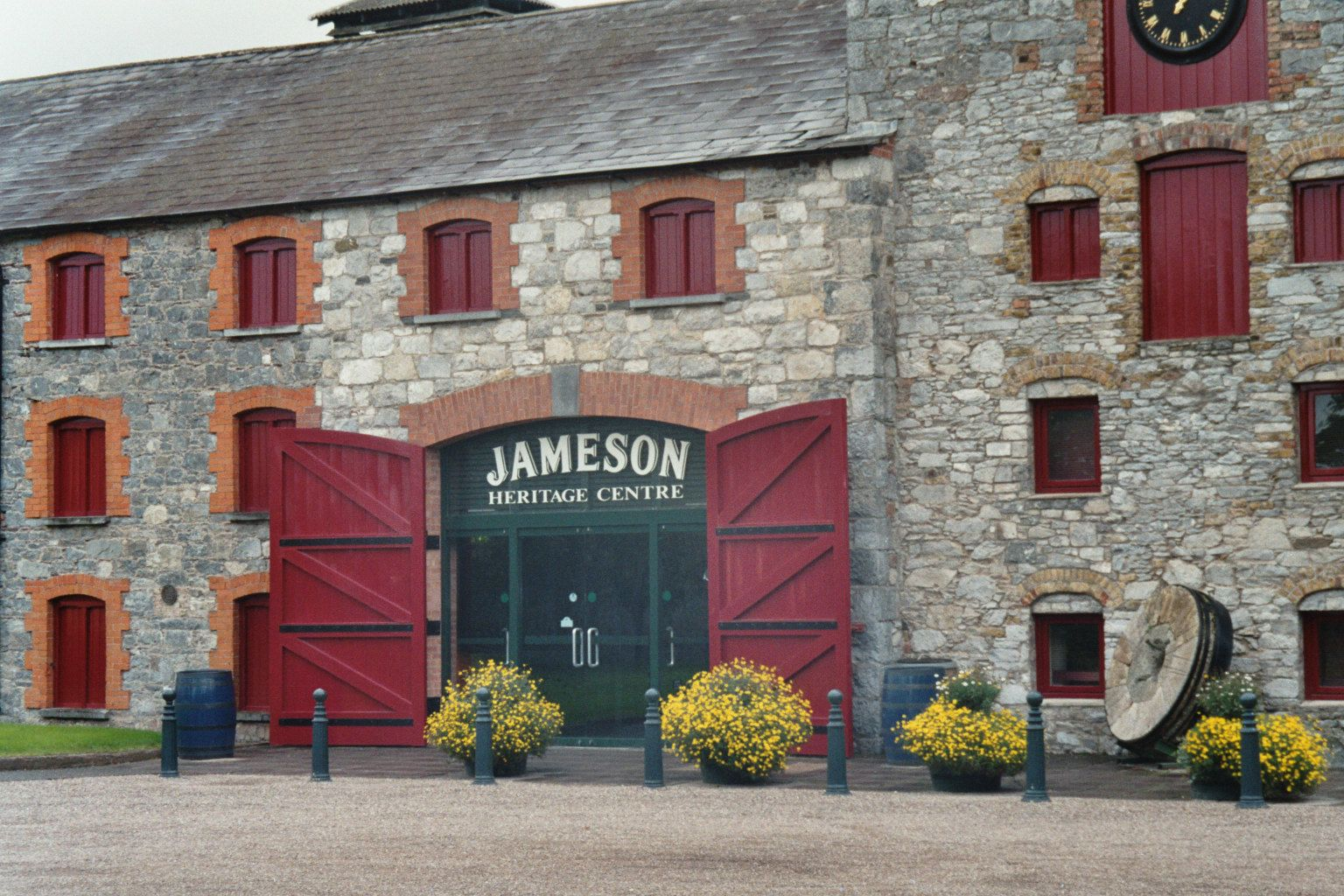 Jameson Whiskey-Destillery in Midleton (Irland)